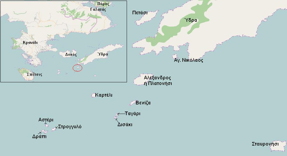 Αλέξανδρος ή Πλατονήσι Ύδρας